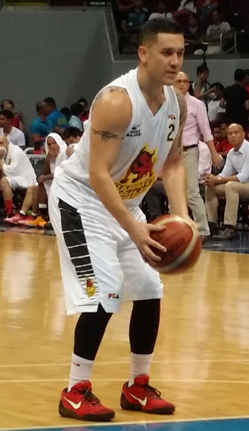 PBA - Globalport vs Barako Bull - Josh Urbiztondo-Barako Bull - 2015-1225